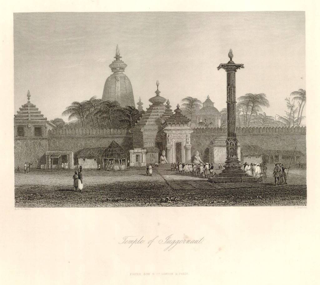 Bild över Juggernauttemplet i Puri i Orissa, söder om Bengalen. William Ward 1815